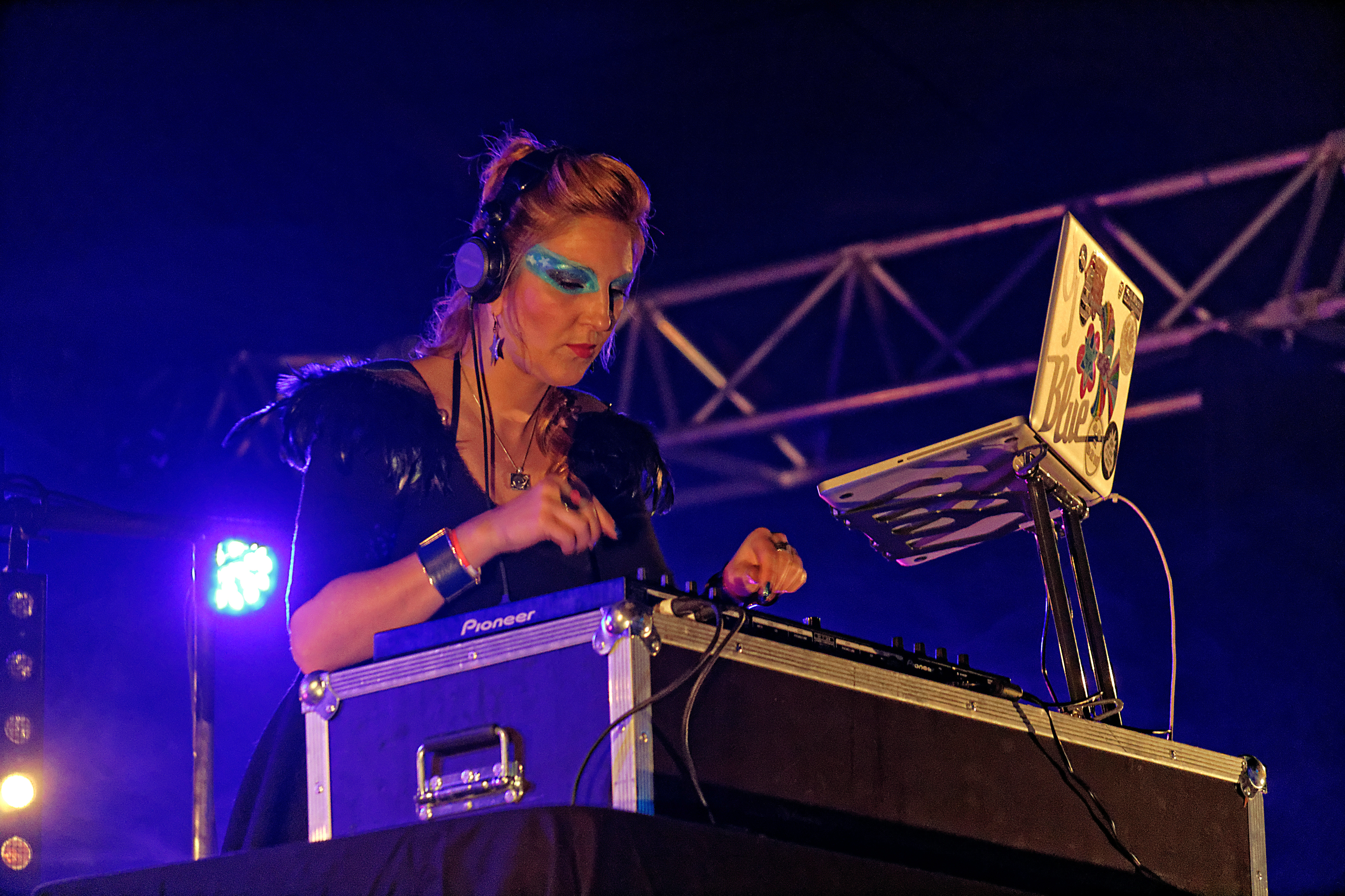 Set de la Dj Miss Blue en conclusion du Stered Festival le 13 Novembre 2015 au Parc des Expos de Langolvas à Morlaix (Finistère, Bretagne).